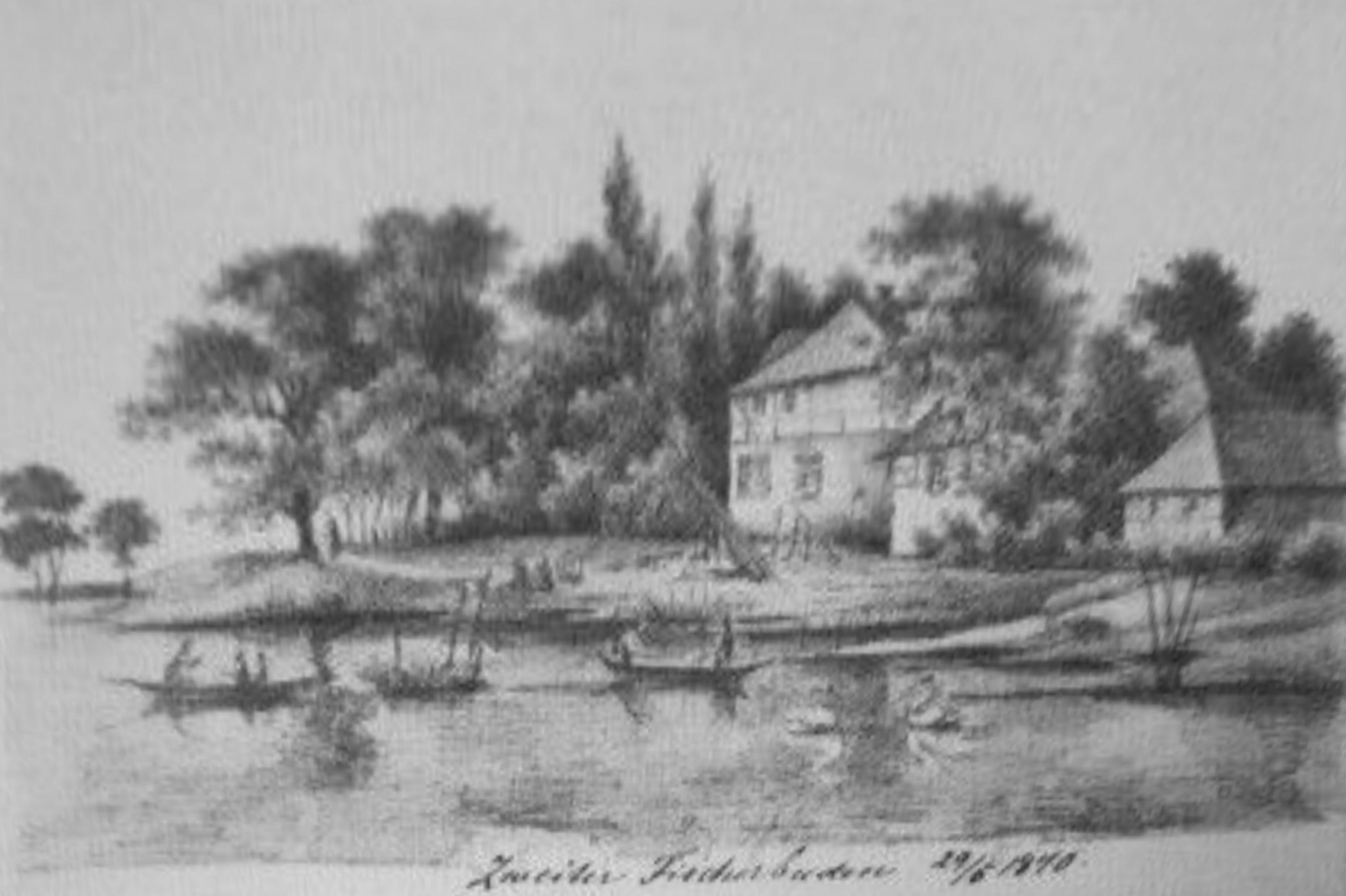 Der Zweite Fischerbuden in Lübeck